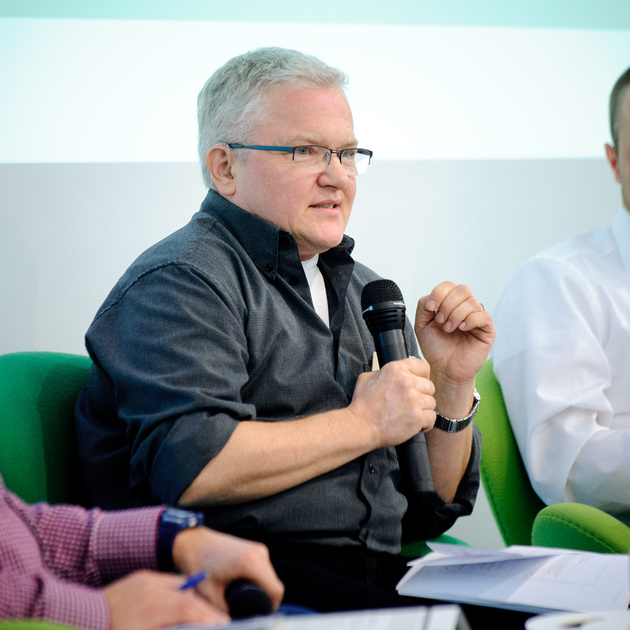 Christian Schenk (MdB a.D.) Fachtagung: Männerleiber - Körperlichkeit zwischen Sein und Tun Foto: Stephan Röhl